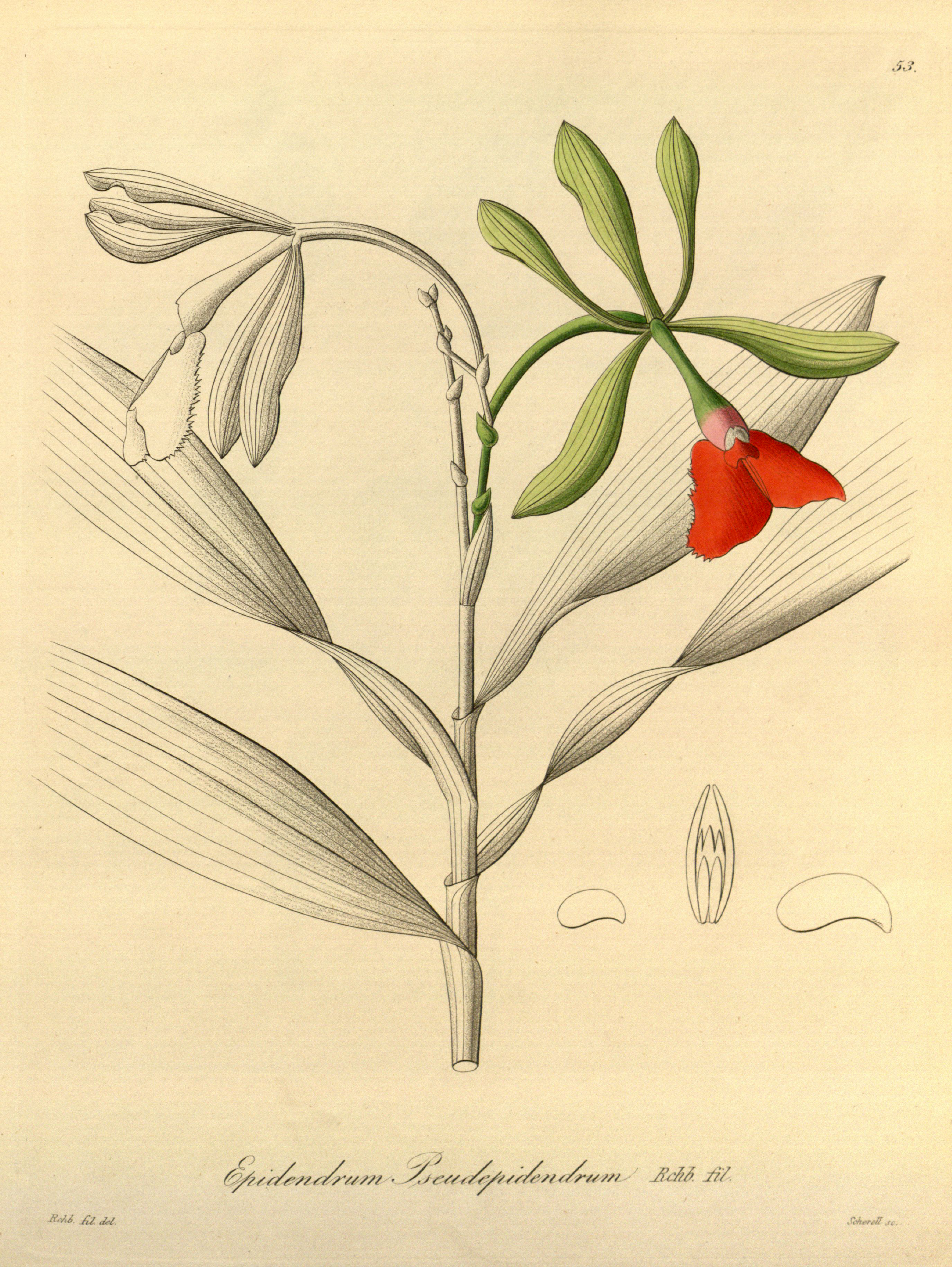 Illustration of Epidendrum pseudepidendrum